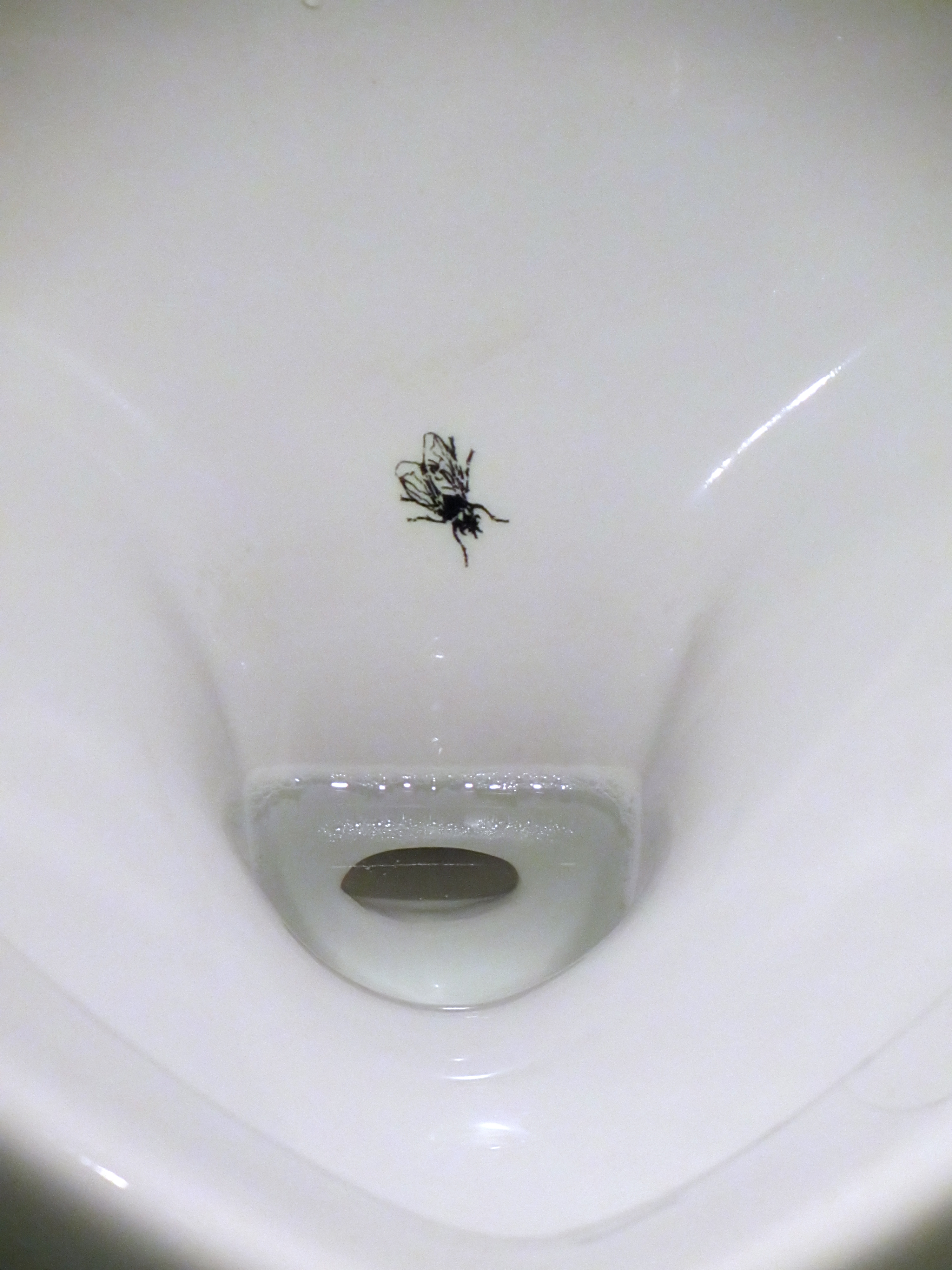 Urinal mit Fliege als Zielobjekt im Porzellan (im Agaplesion Krankenhaus Neu Bethlehem, Göttingen)